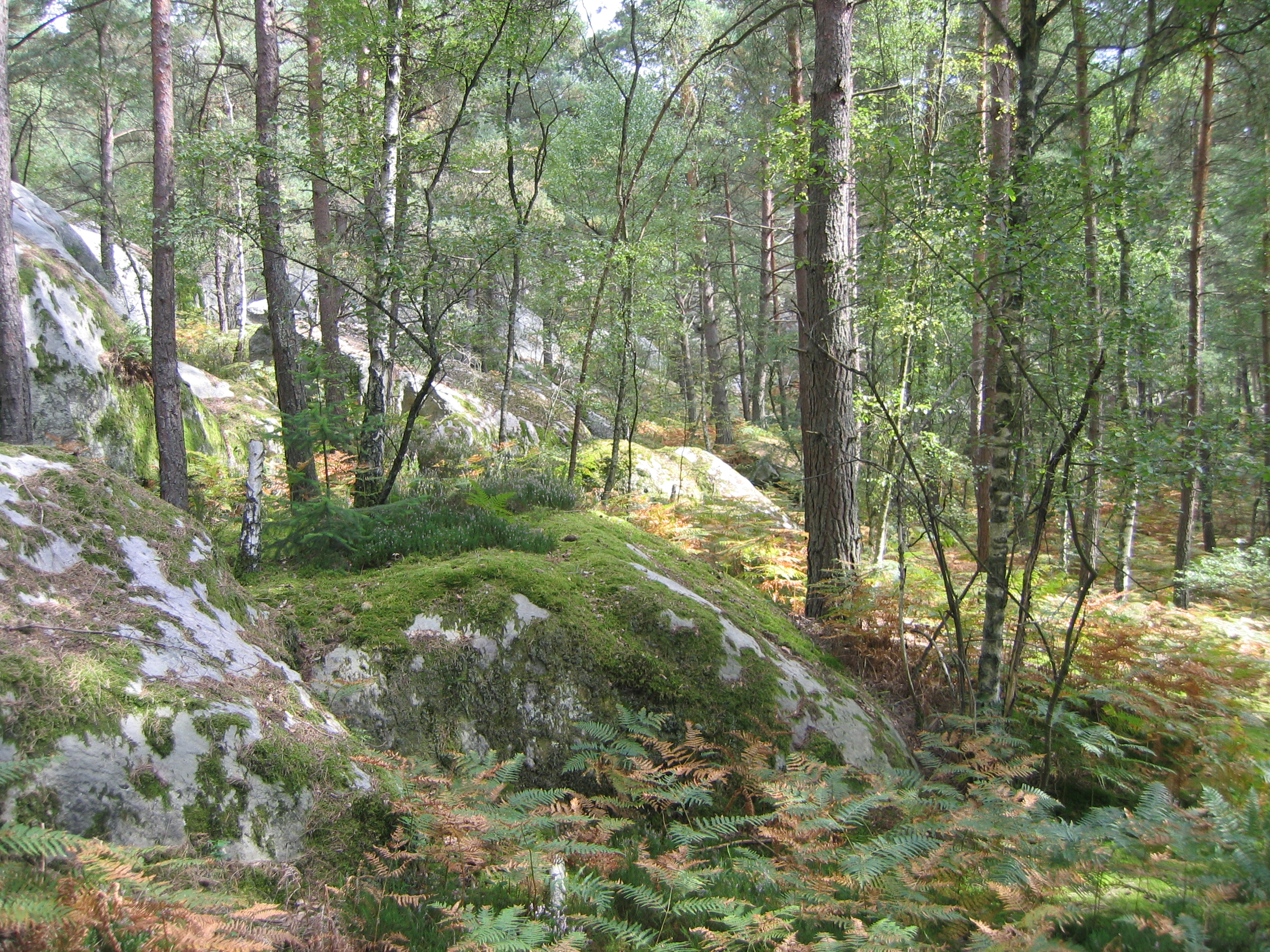 Vue d'ensemble